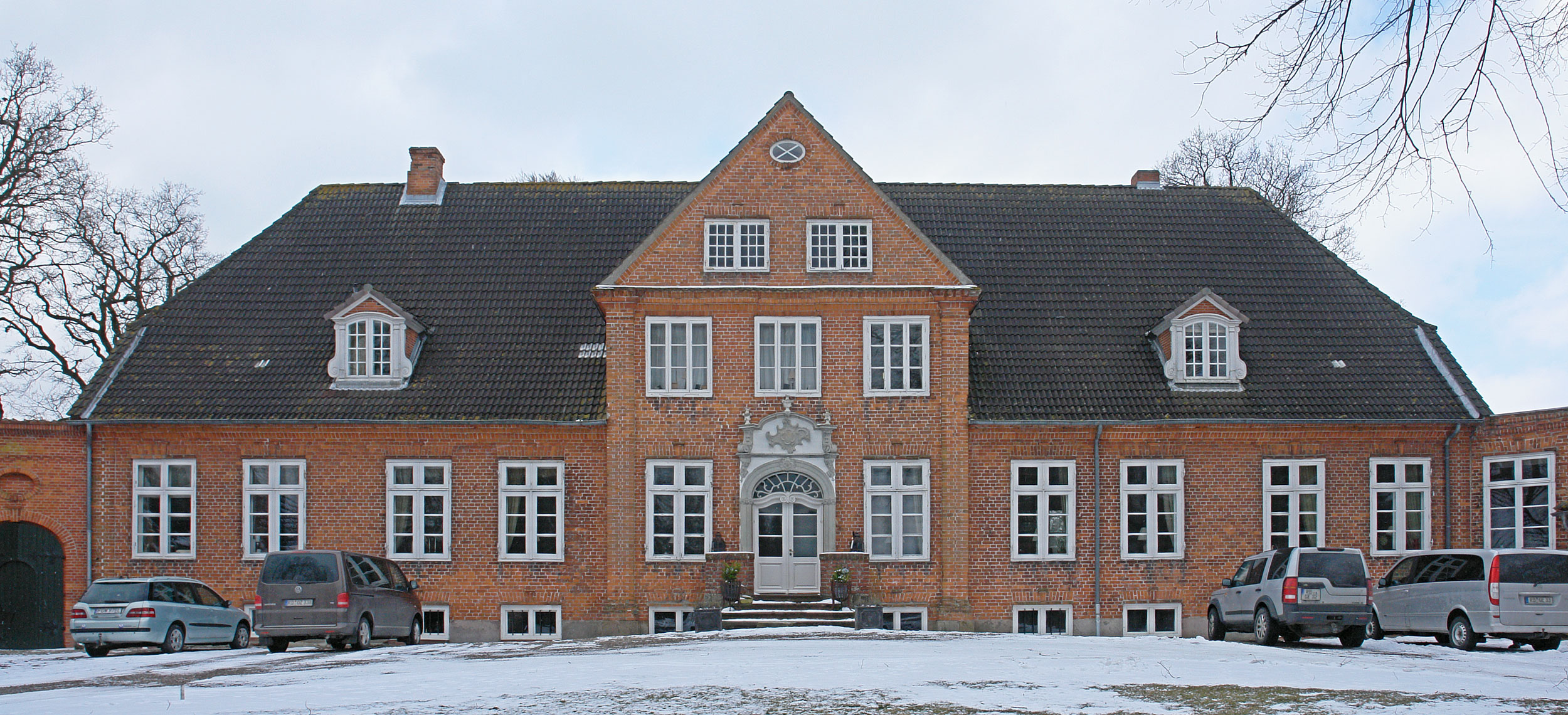 Gut Eckhof, Dänischenhagener Straße: Herrenhaus